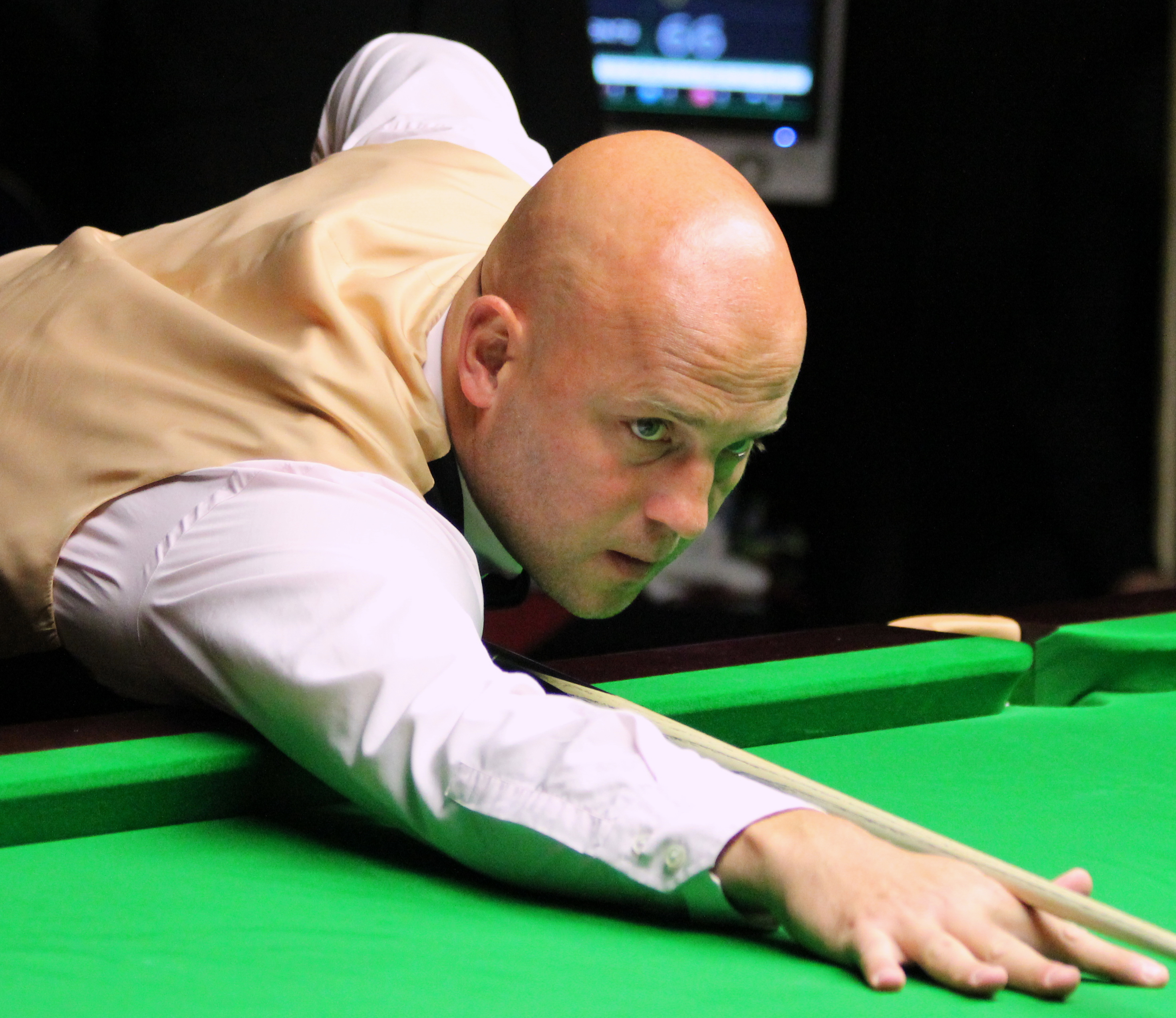 Mark King beim Paul Hunter Classic 2012